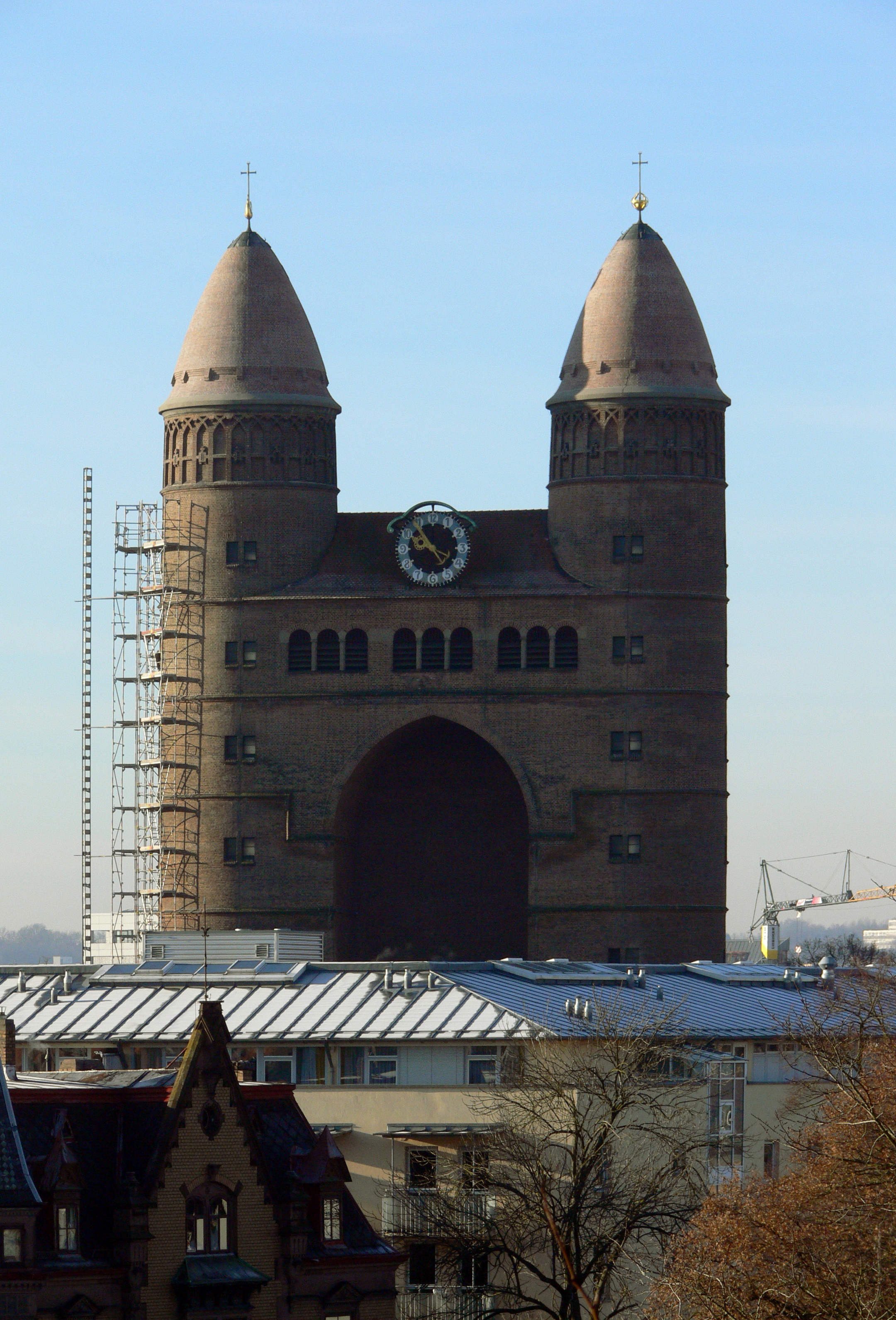 Pauluskirche in Ulm, fotografiert von der Hochschule Ulm. Am rechten Rand wurde die Spitze eines Baukrans im Himmel retuschiert.